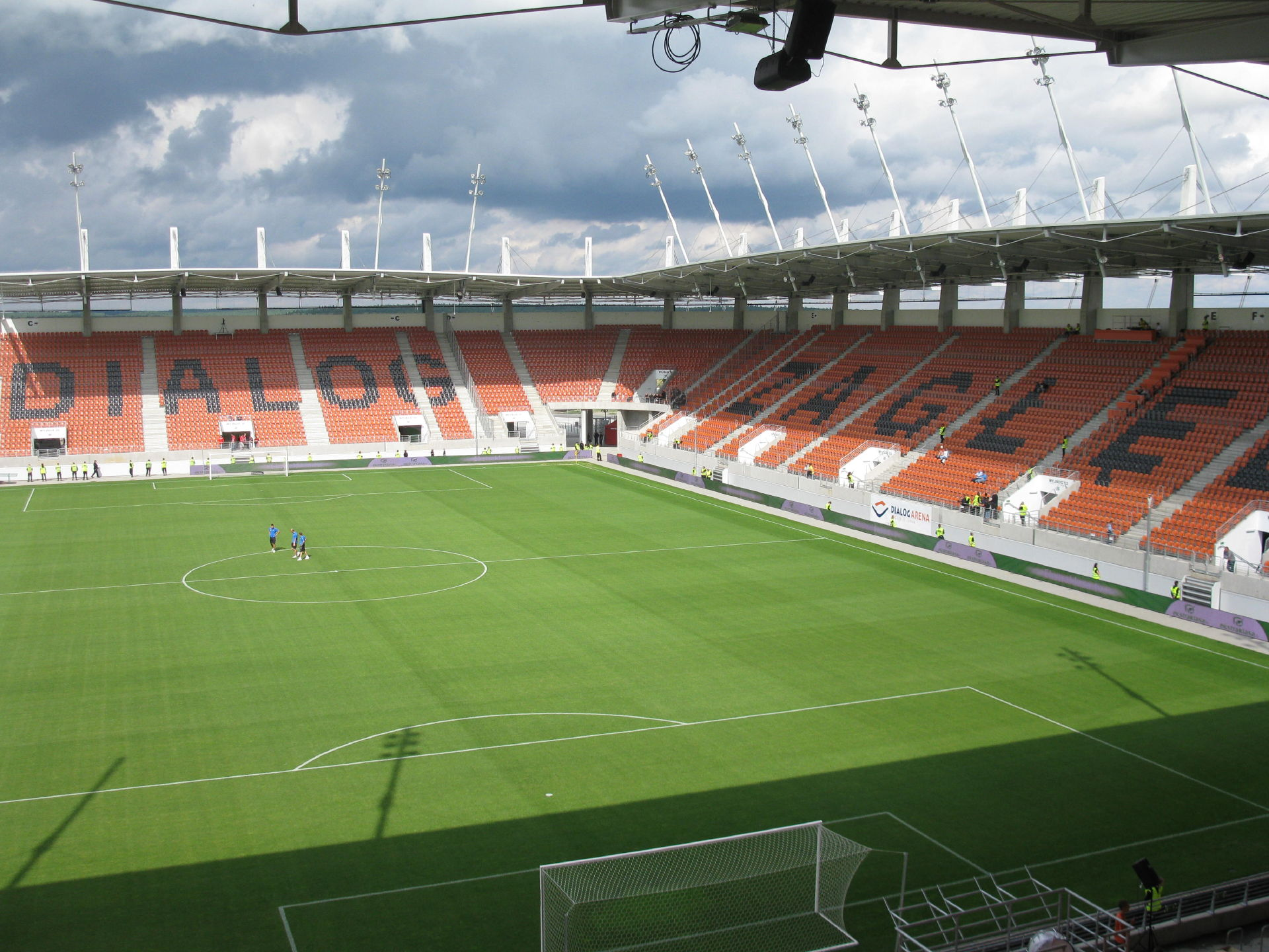 Dialog Arena przed Superpucharem Polski w 2009 r.